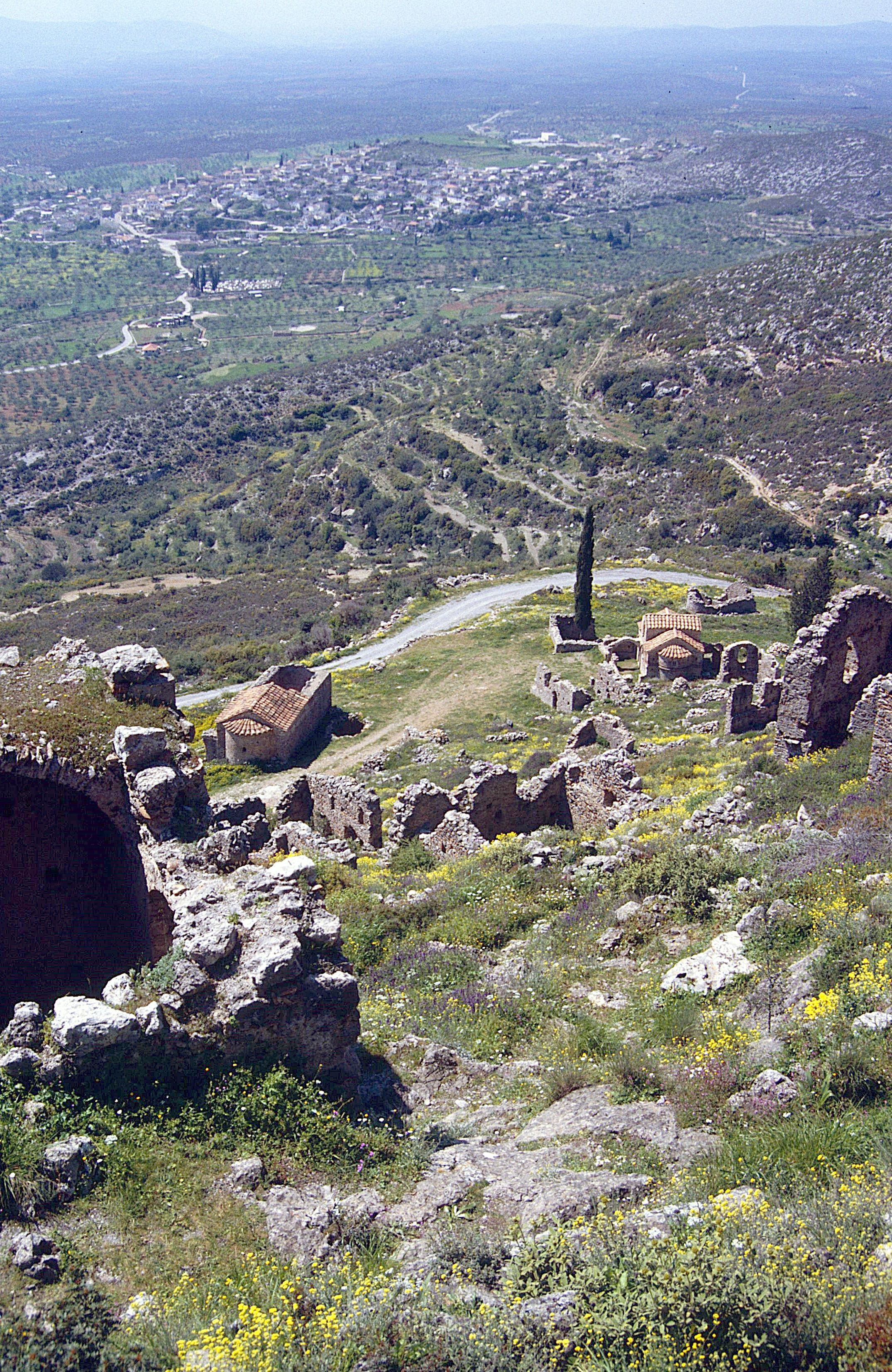 byzantinische Ruinenstadt Geraki